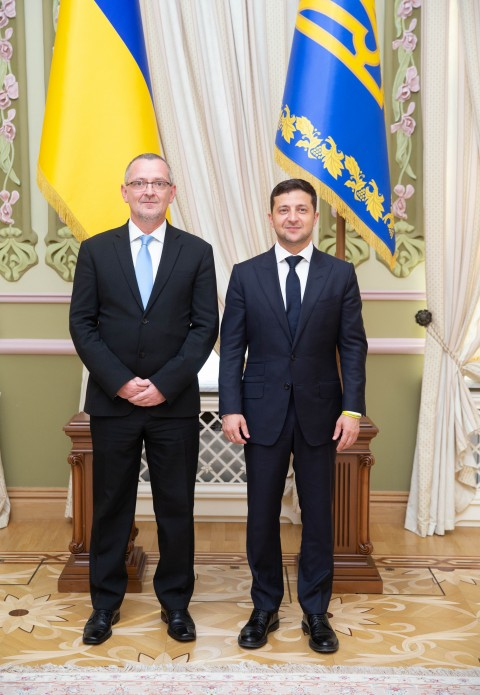 Президент України Володимир Зеленський прийняв вірчі грамоти у послів низки іноземних держав: Республіки Словенія – Томажа Менціна.